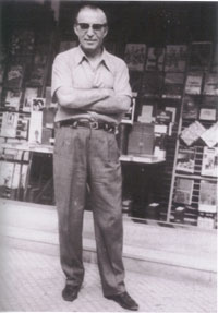 Giulio D'Anna